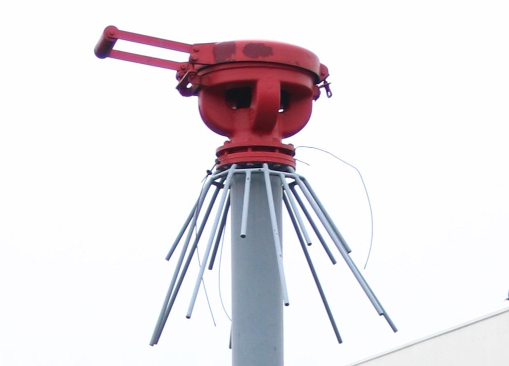 Flammendurchschlagsicherung an dem stillgelegten Schacht 4 der Zeche Zollverein, Essen, (Portegohaube)